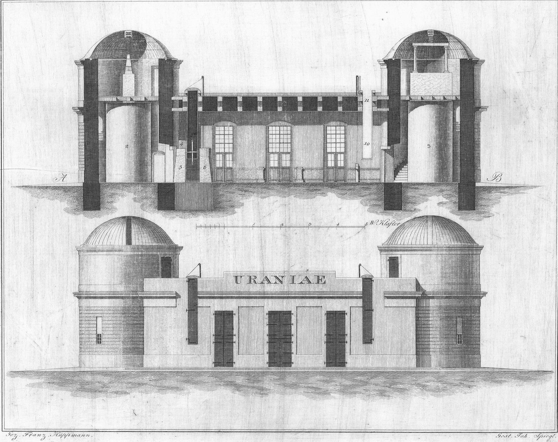 Qafár af: A Gellért-hegyi Csillagda tervrajza 1813.ból. 1815-ben avatták fel a budapesti egyetem kettős kupolájú obszervatóriumát a Gellérthegy tetején. Számtalan korabeli látképen látható a Gellérthegyen trónoló csillagvizsgálóval, több olyan ábrázolás is készült, melyeken mind a régi, mind az »új« csillagda látható! Az Urániához, a csillagászat múzsájához címzett intézmény és berendezése a budai vár 1849-es ostromakor súlyosan megsérült, azonban a csillagvizsgáló-épület még csaknem húsz évig állt a »köré« felépült Citadella falai között.